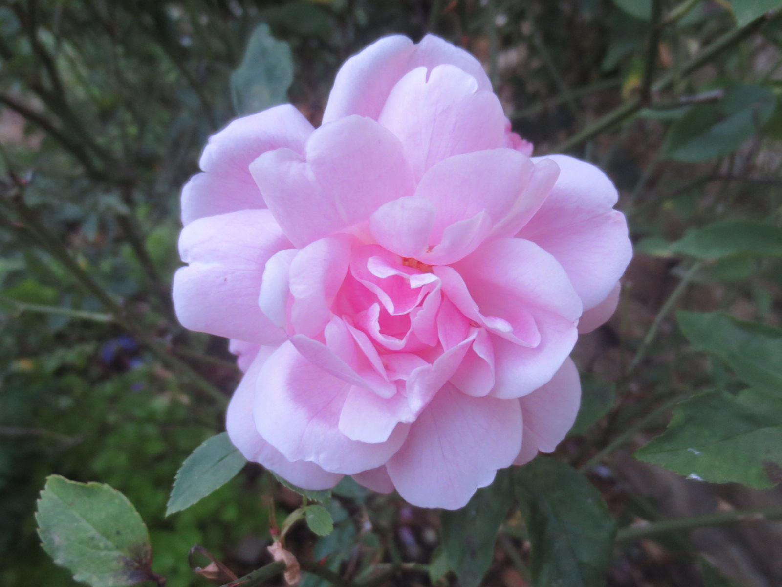 Clos Barbisier, rose Old Blush